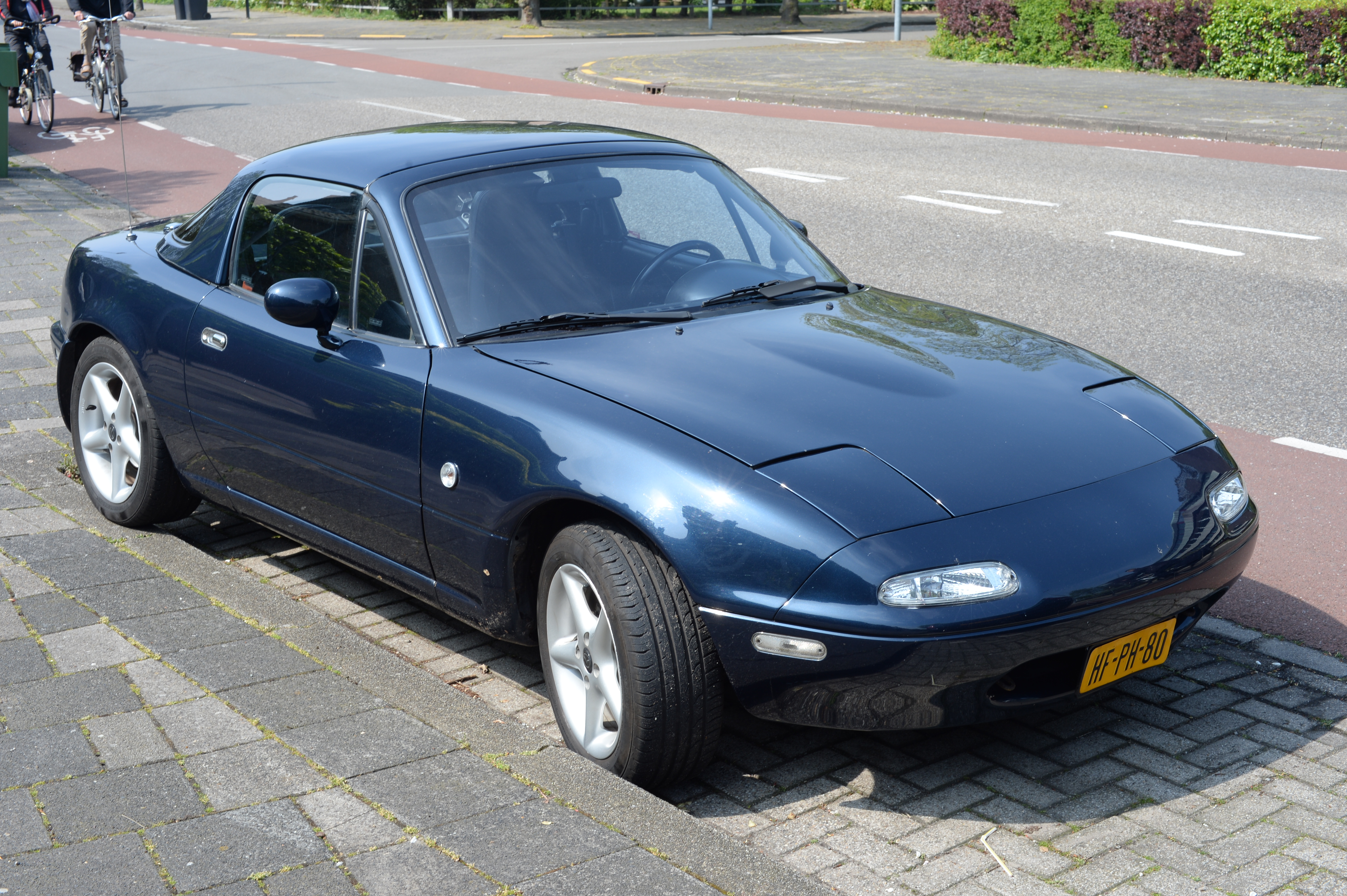 1993 Mazda MX-5